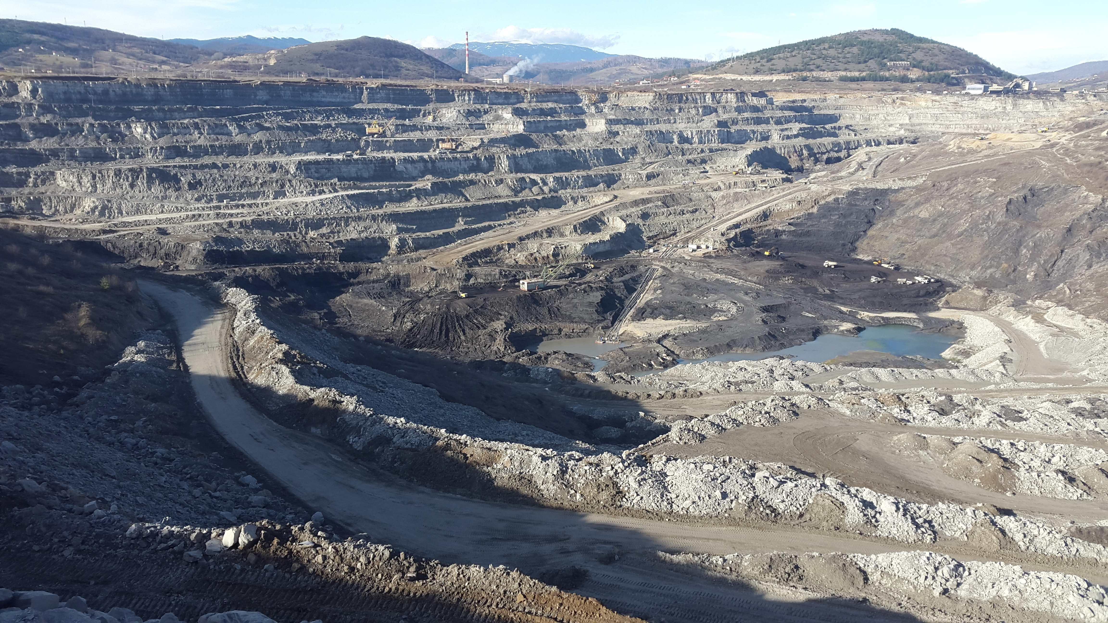 Површински коп Потрлица